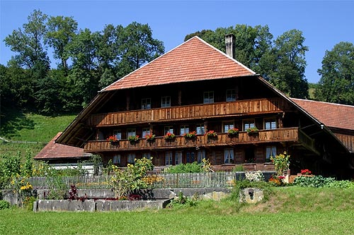 Bauernhof in Bärau (Emmental)